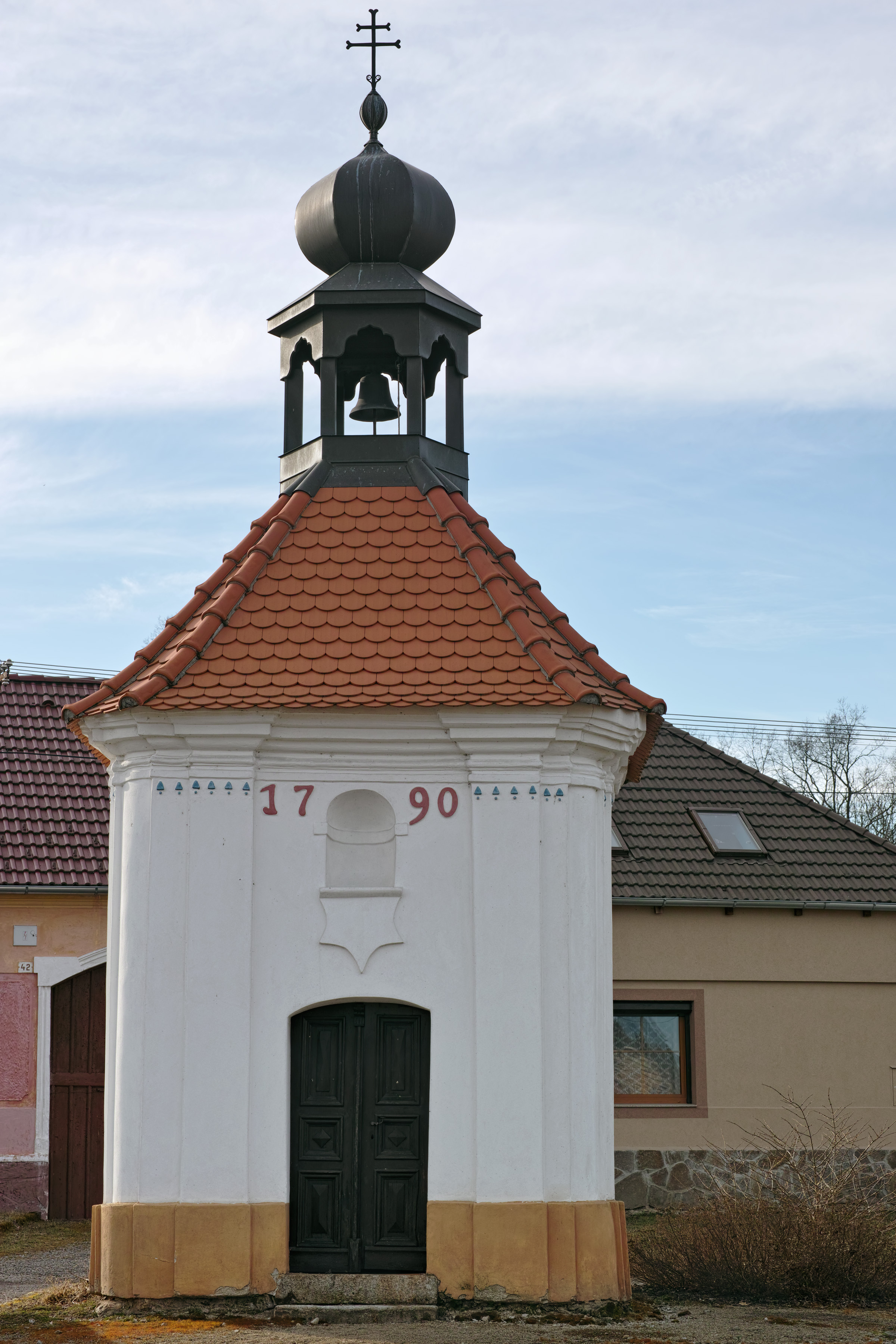 Podeřiště, návesní kaple, 1790